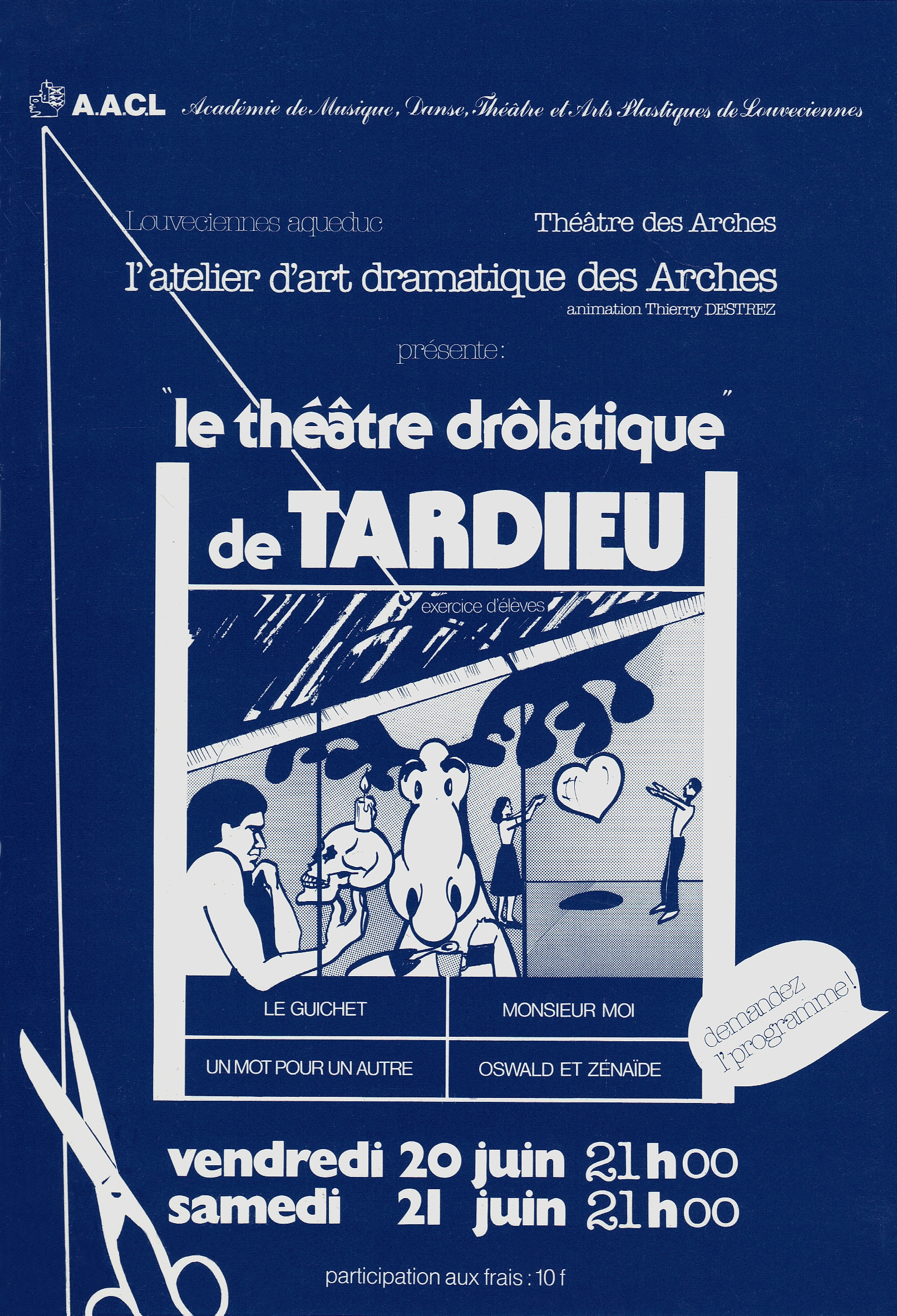 Affiche pour Le Théâtre Drôlatique de Jean Tardieu, au Théâtre des Arches monté par Thierry Destrez